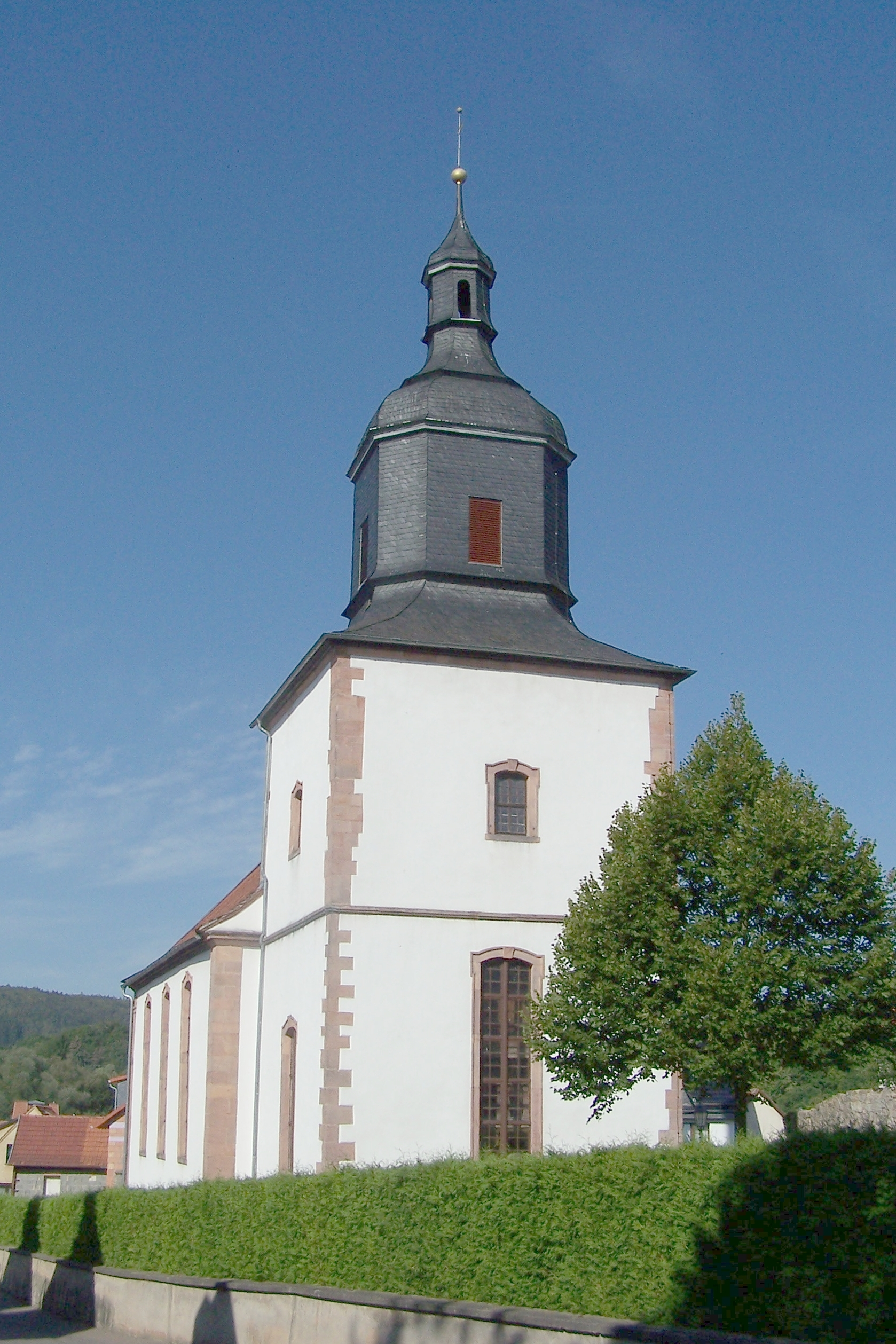 Weilar